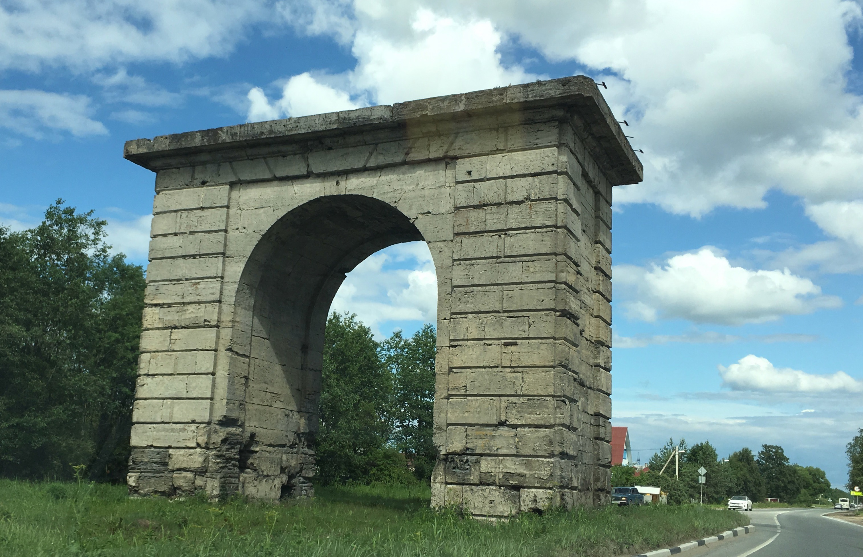 Мозинские ворота